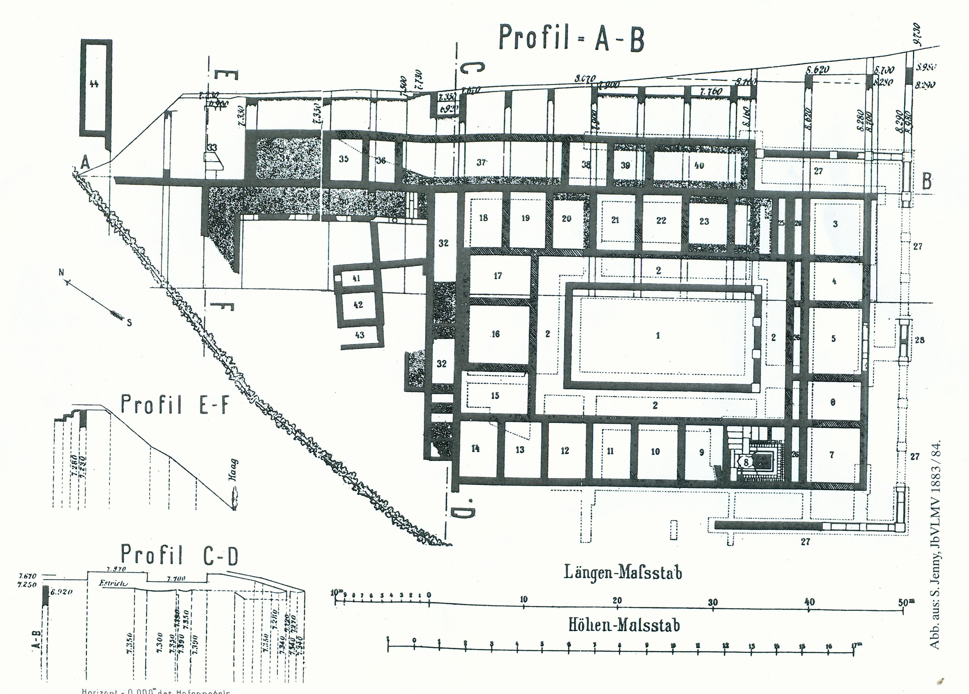 Samuel Jenny, Grundriss der römischen Kaufmannsvilla "Am Steinbühel" in Bregenz (Brigantium)